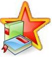 A barnstar.